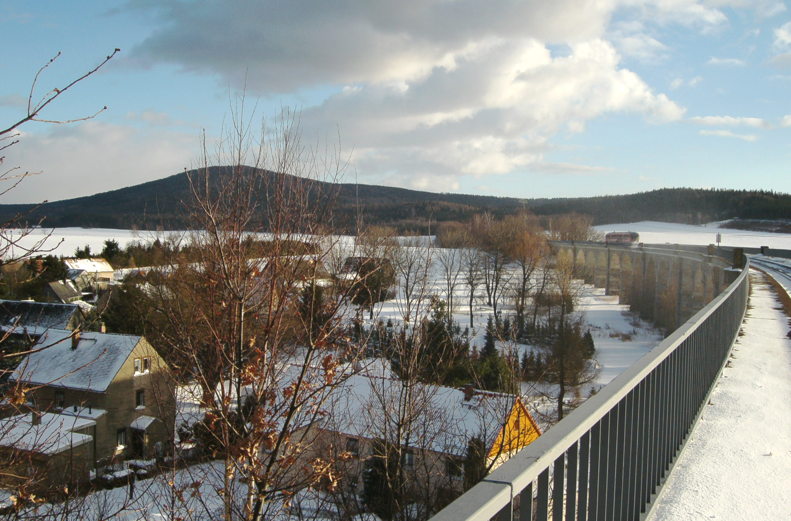 Eisenbahnviadukt in Putzkau mit Regionalbahn in Richtung Zittau, im Hintergrund der Valtenberg Hornjoserbsce: Železniski wiadukt w Póckowach, Sokolnik w pozadku.